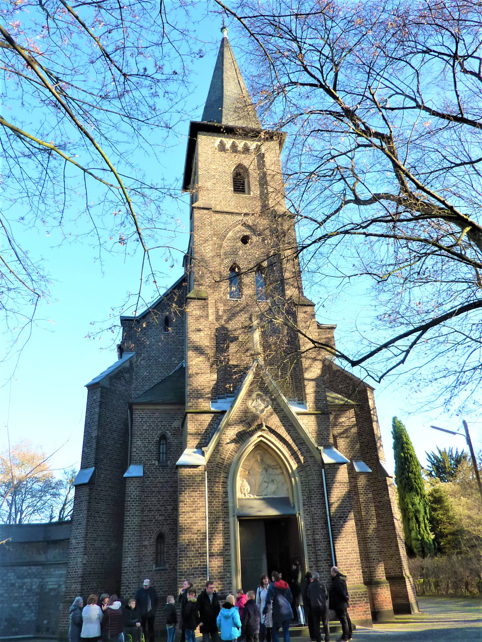 St. Johannes vor dem Lateinischen Tore (Köln-Bocklemünd)